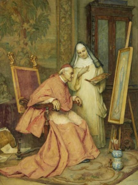 Il cardinale e la suora, acquerello, 62 x 45 cm., coll. privata